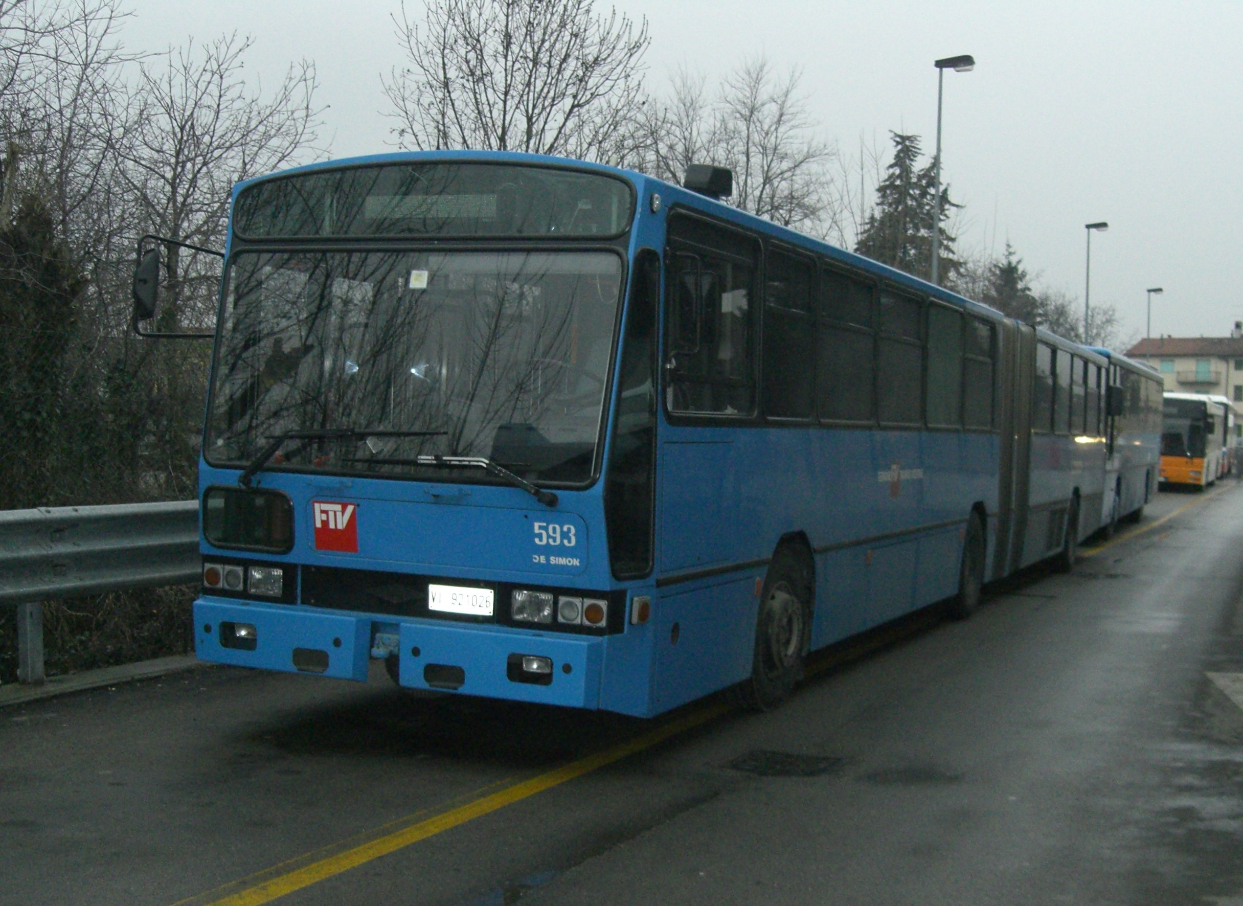 Inbus AID 280 FT bus nr. 593 della Ferrovie e Tramvie Vicentine (FTV).